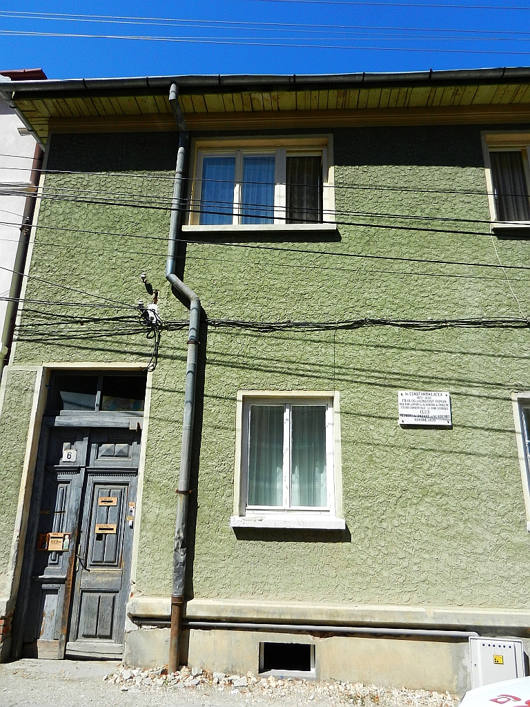 Casa Constantin Lacea